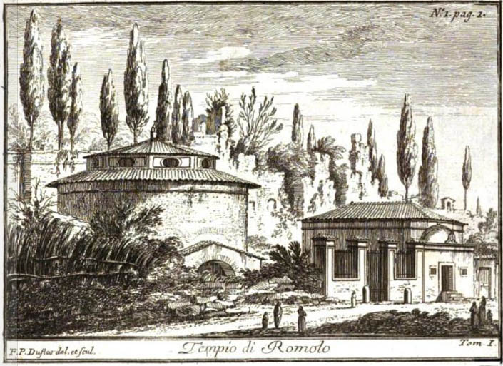 Roma, chiesa di San Teodoro al Palatino (c.d. Tempio di Romolo) in una stampa del XVIII secolo. Si noti l'interramento. Da Ridolfino Venuti, Accurata e succinta descrizione topografica delle antichità di Roma, Volume 1, Roma 1763